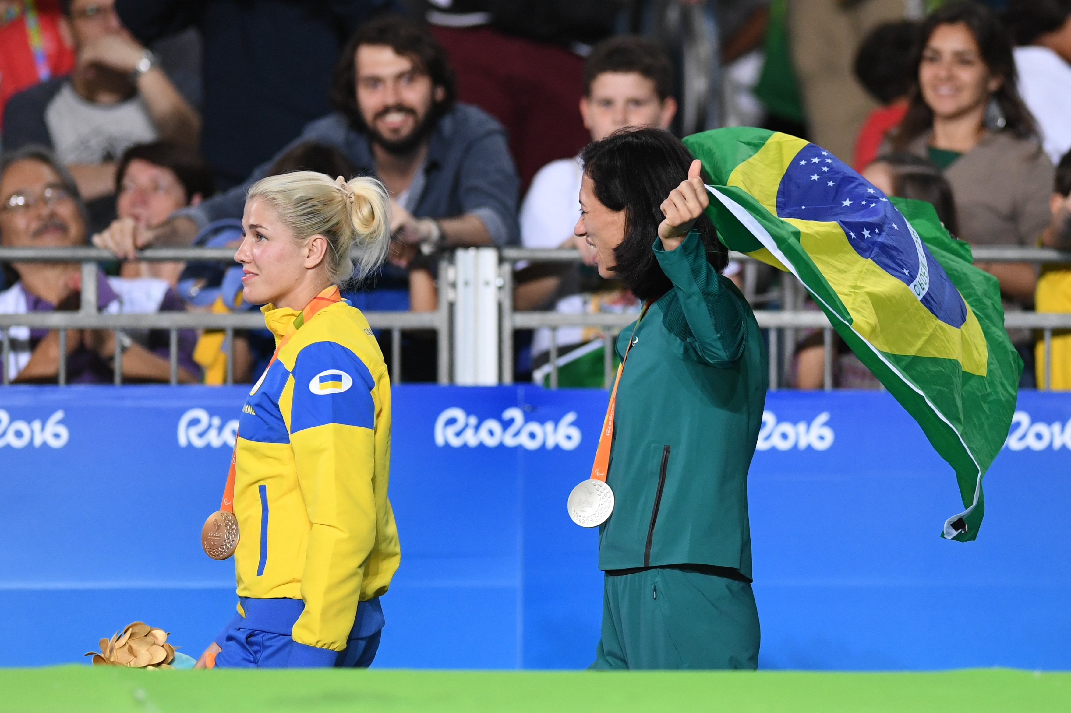 Rio de Janeiro - A brasileira Lucia Araújo perde para a ucraniana Inna Cherniak na final do judô feminino 57kg e fica com a medalha de prata na Paralímpiada Rio 2016 (Tânia Rêgo/Agência Brasil)